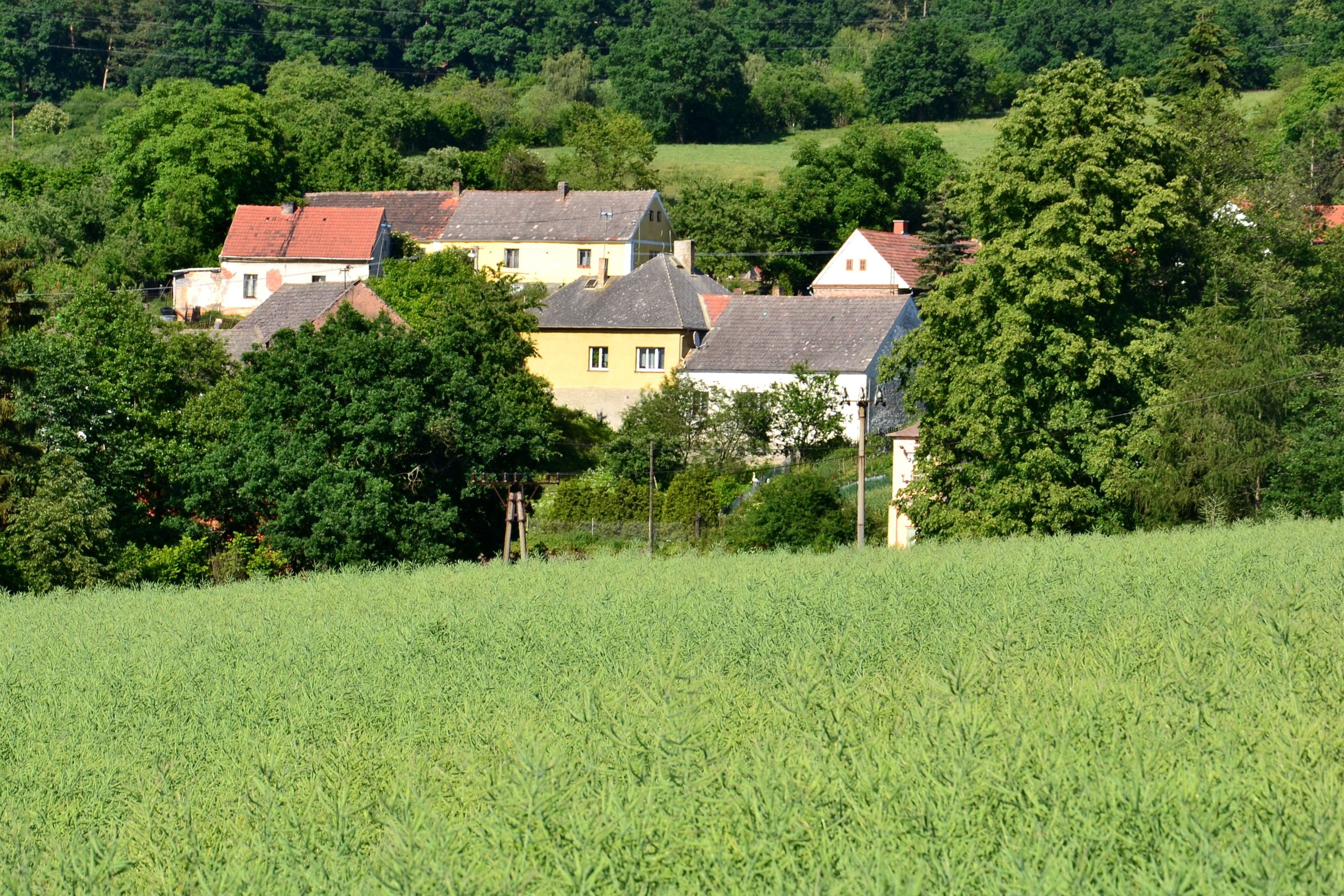 Jižní část vesnice